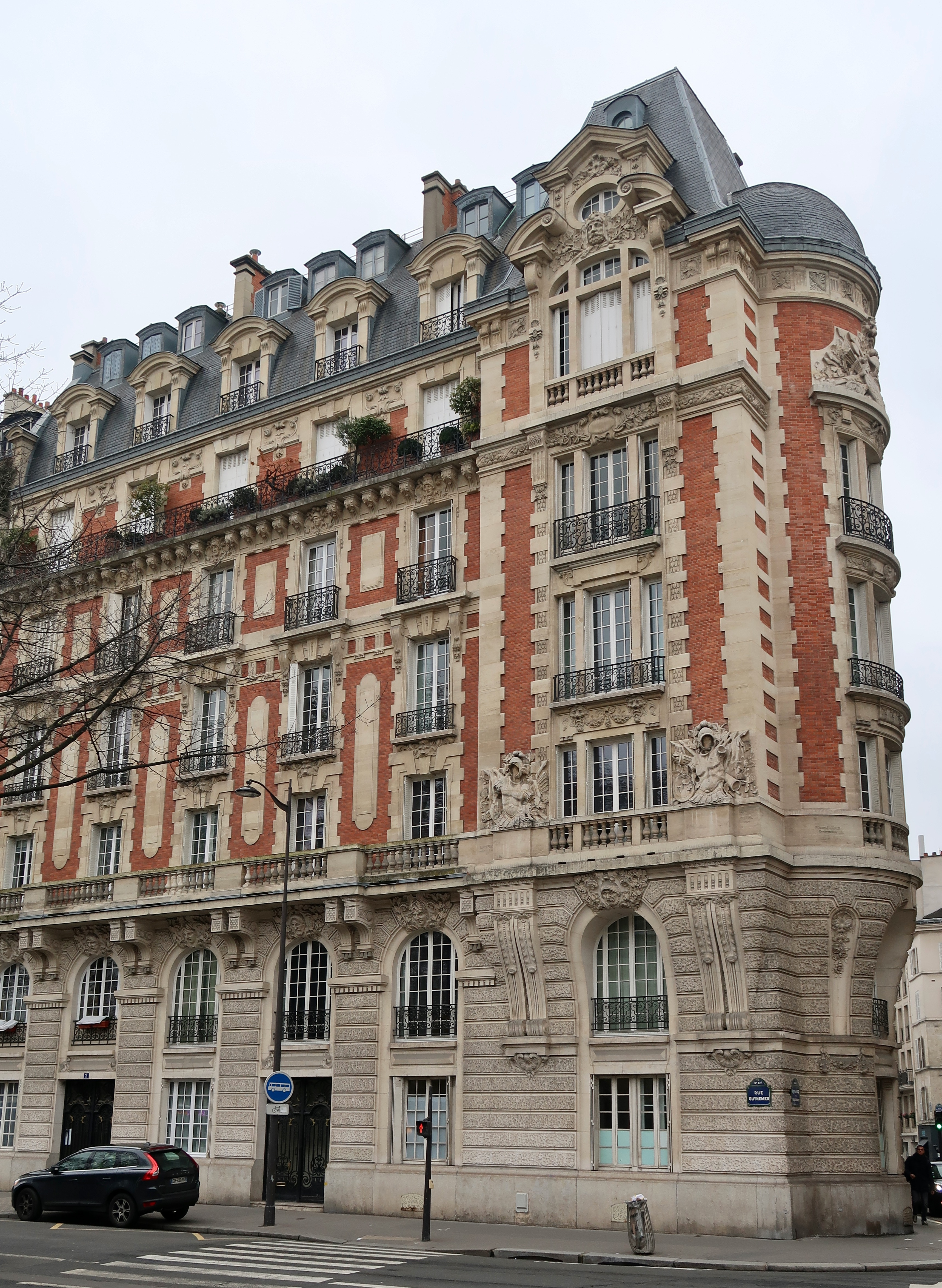 Immeuble au croisement de la rue Guynemer et de la rue de Vaugirard (Paris, 6e).